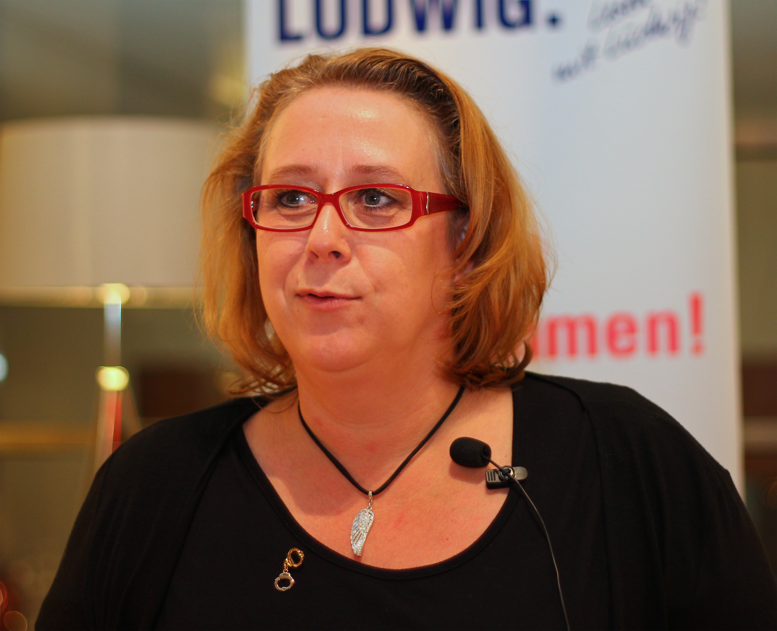 Schriftstellerin Elke Pistor liest in Köln.